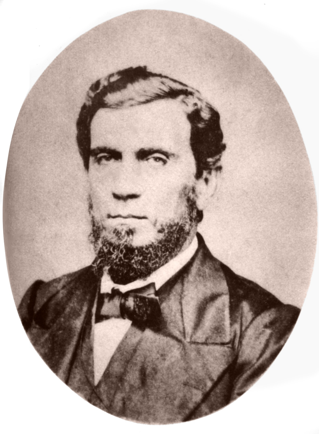 Antonio Herculano de Souza Bandeira, deputado brasileiro durante o Império; avô do poeta Manuel Bandeira